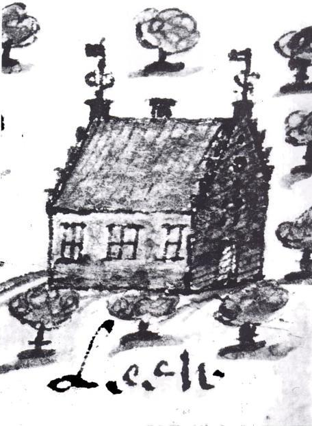 Afbeelding van de borg Beusum of Bewsum op een kaart uit ca. 1626